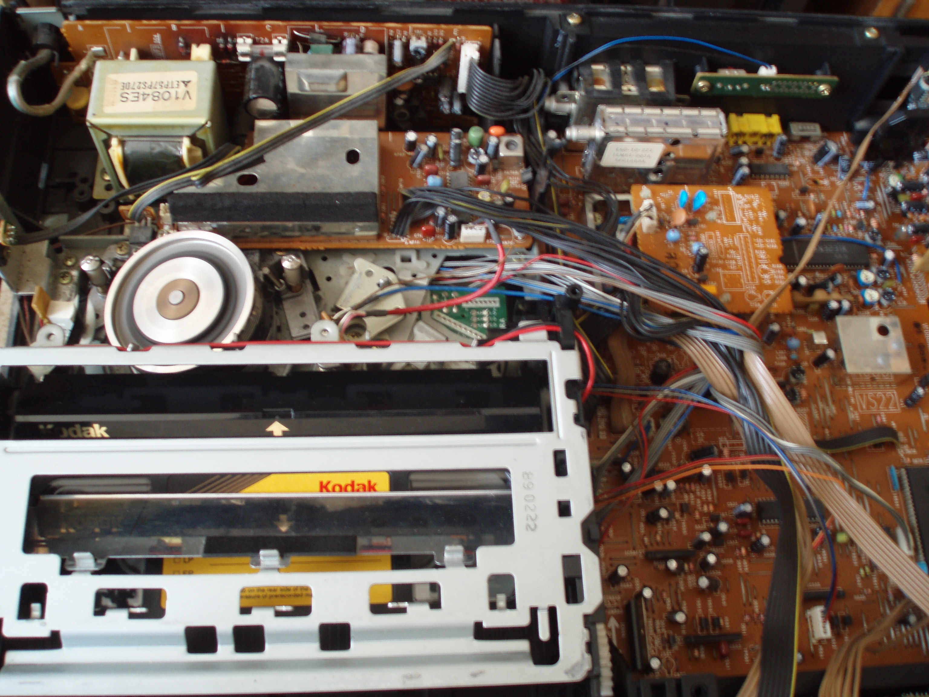 Akai VS-23EDI videomagnetofon belseje, lejátszás közben